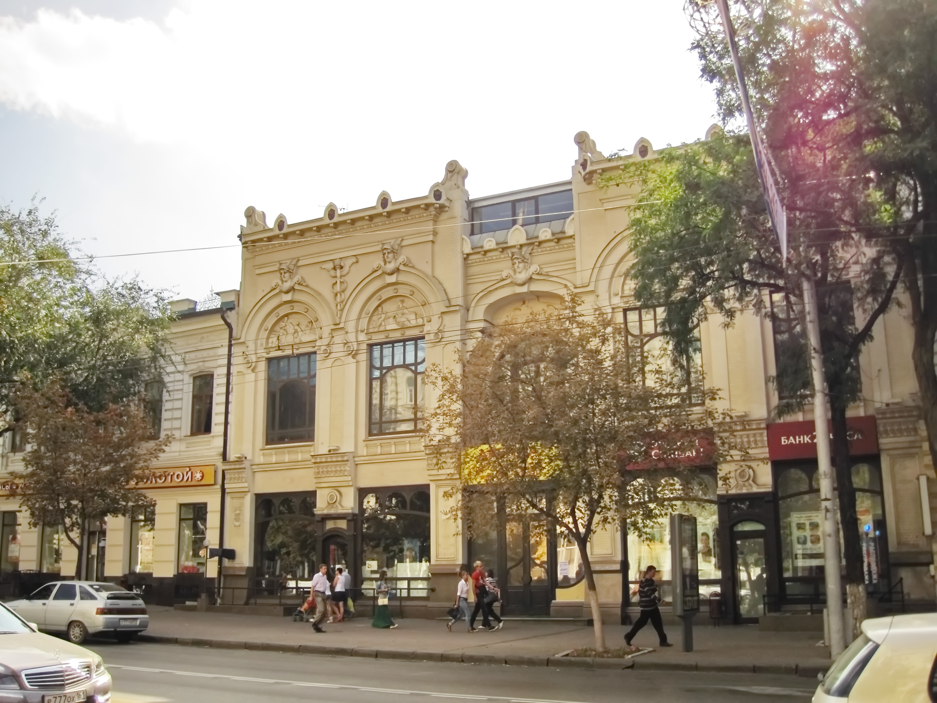 торговый дом Яблоковых